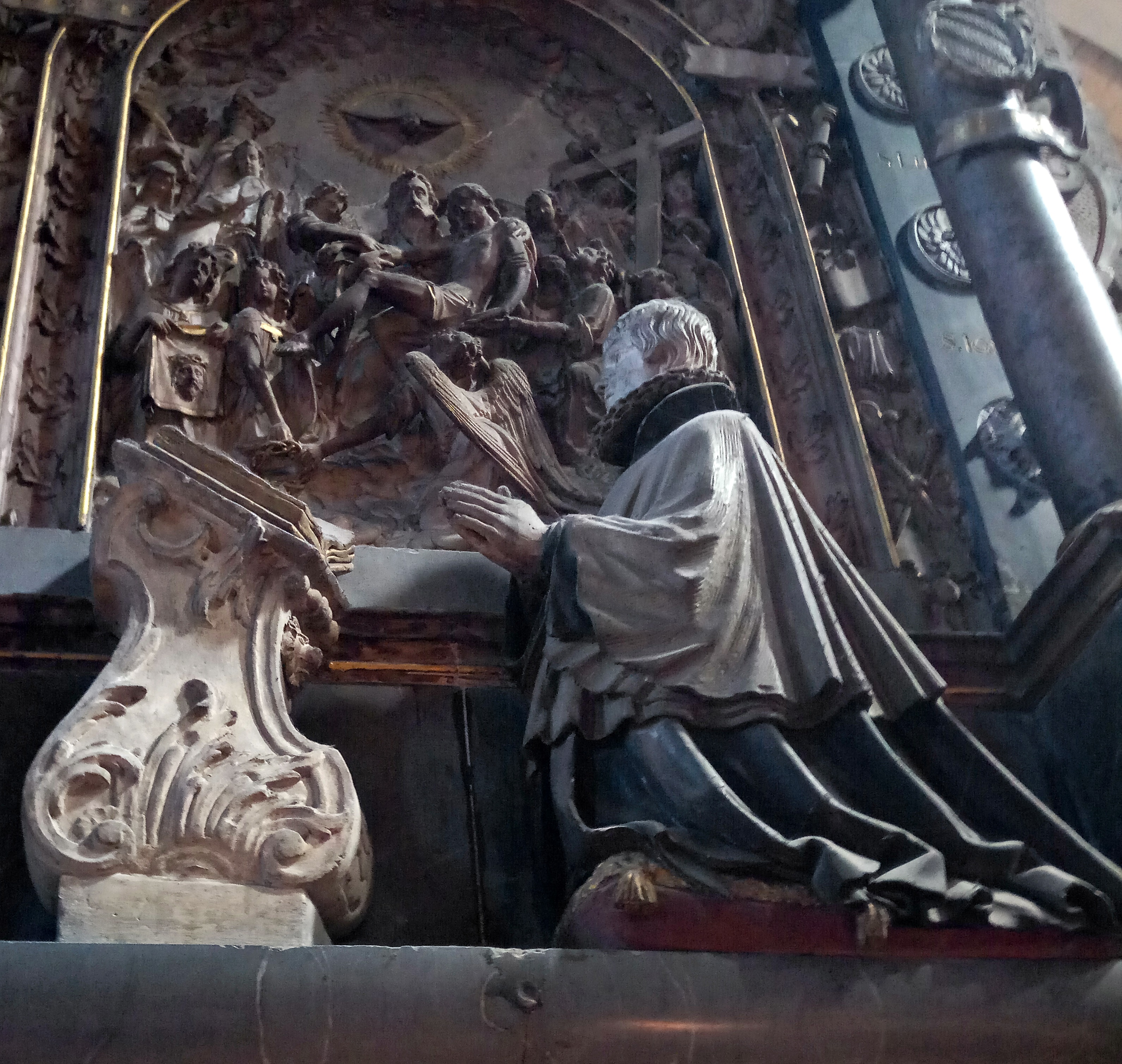 Mainzer Dom, Epitaph des Domkapitulars Wolfgang von Heusenstamm (+ 1594)